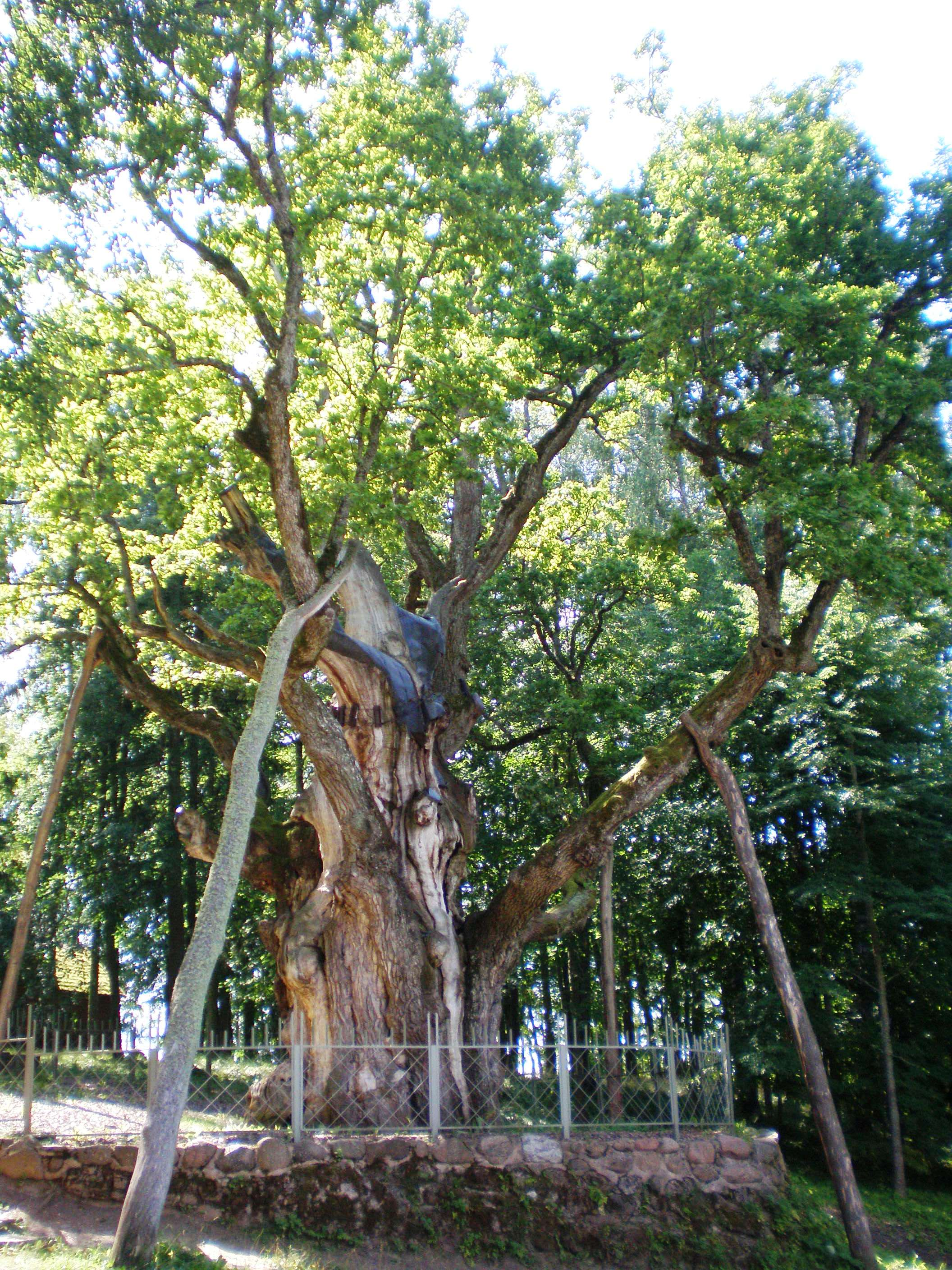 Stelmužės ąžuolas, Zarasų raj., Lietuva